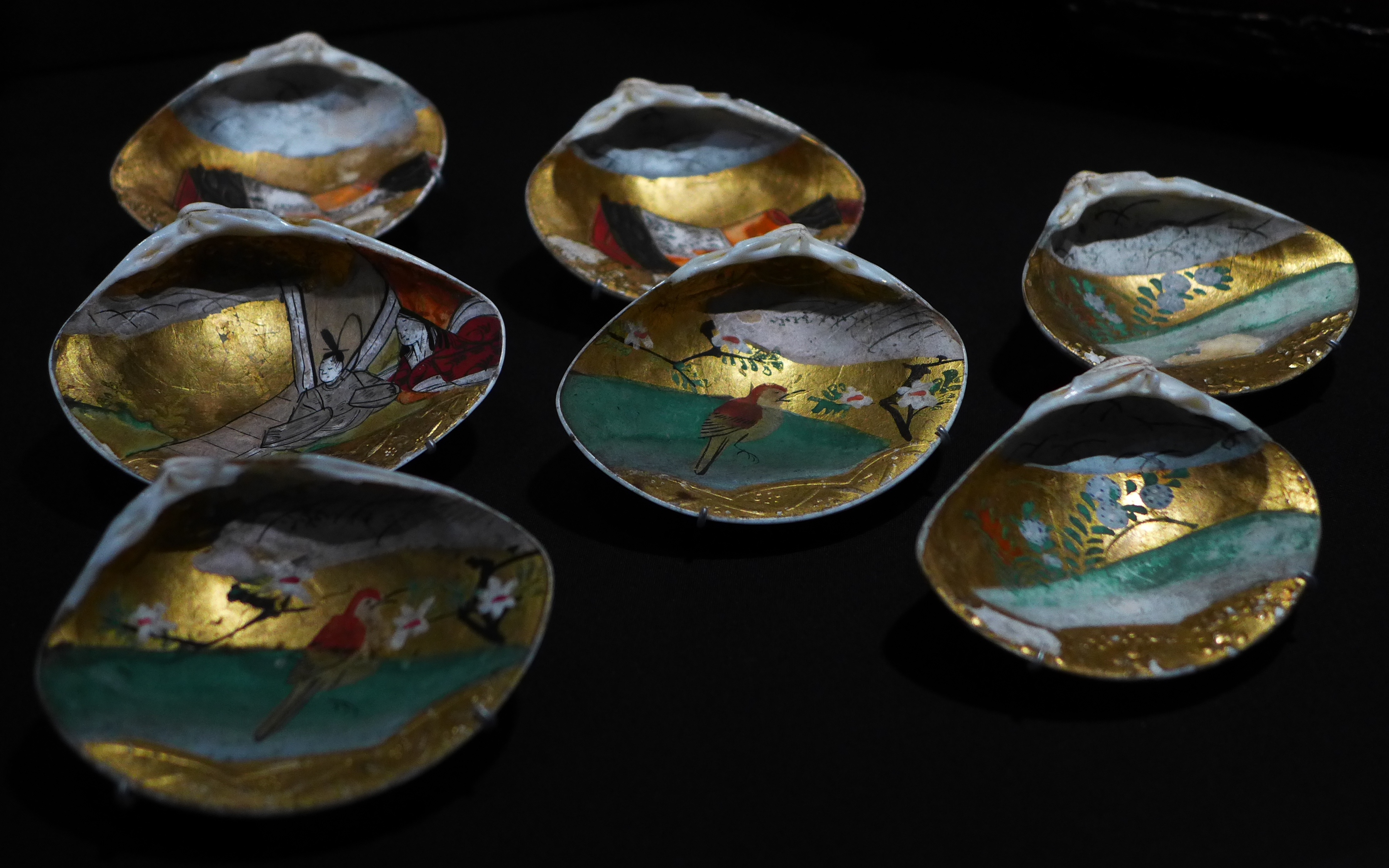 Muschelschalen, Bemalung: Blattgold auf Perlmutt öffentlich ausgestellt zur Wiedereröffnung des Herzog Anton Ulrich-Museums